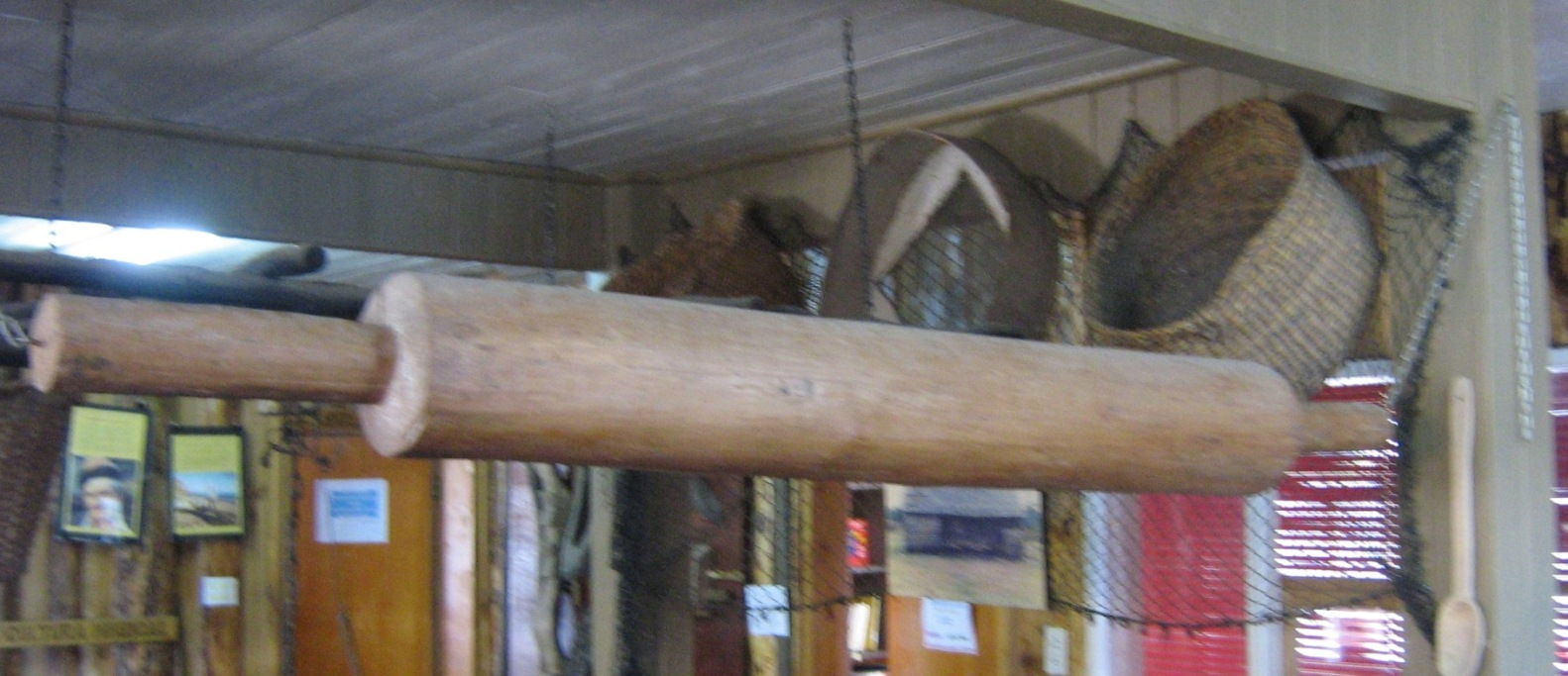 Palo chochoquero, utensilio para preparar chochoca, una comida típica de Chiloé. Museo de Dalcahue, Chiloé, Chile.